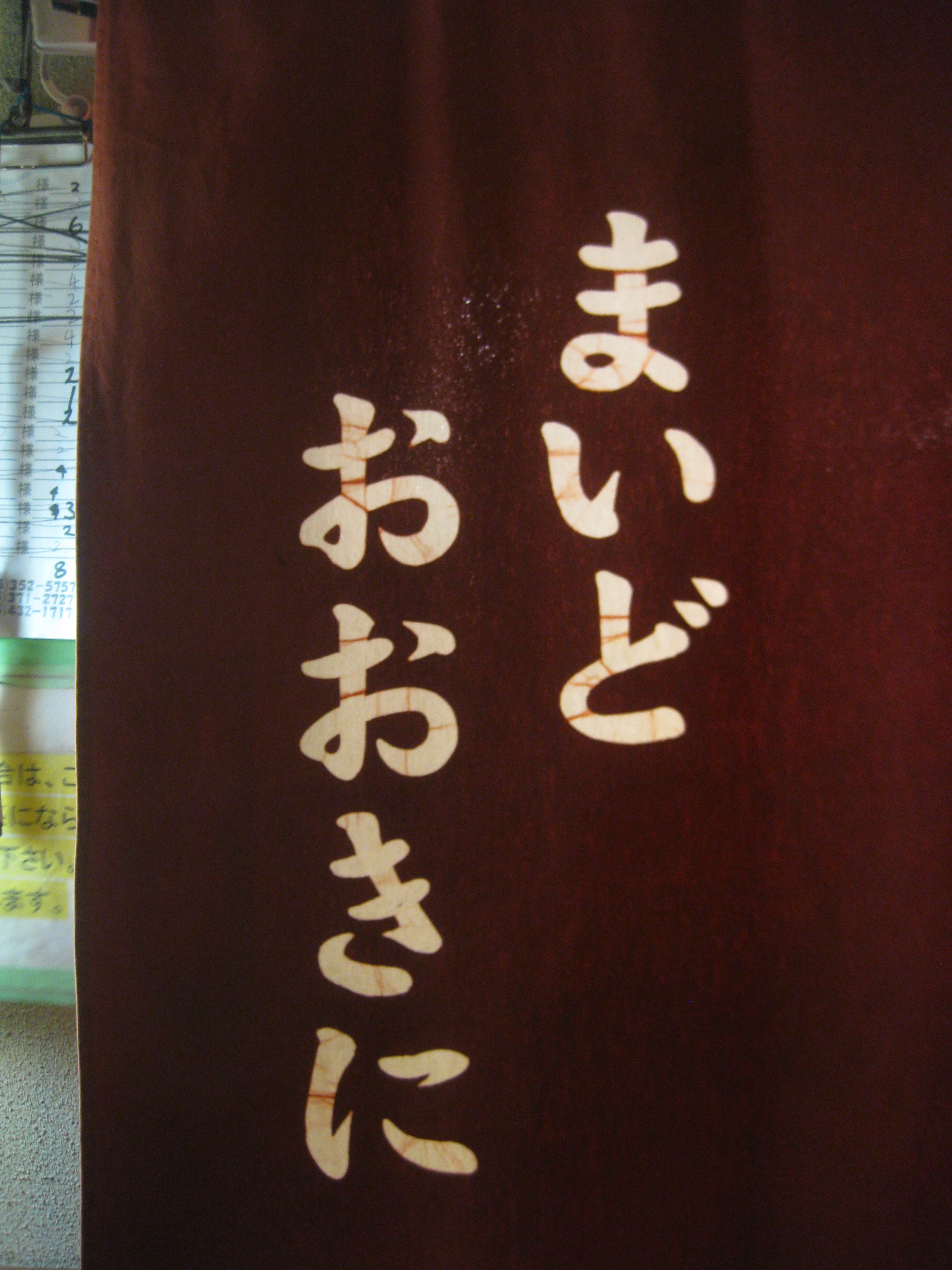 京都弁を用いた暖簾。京都市内の飲食店にて。